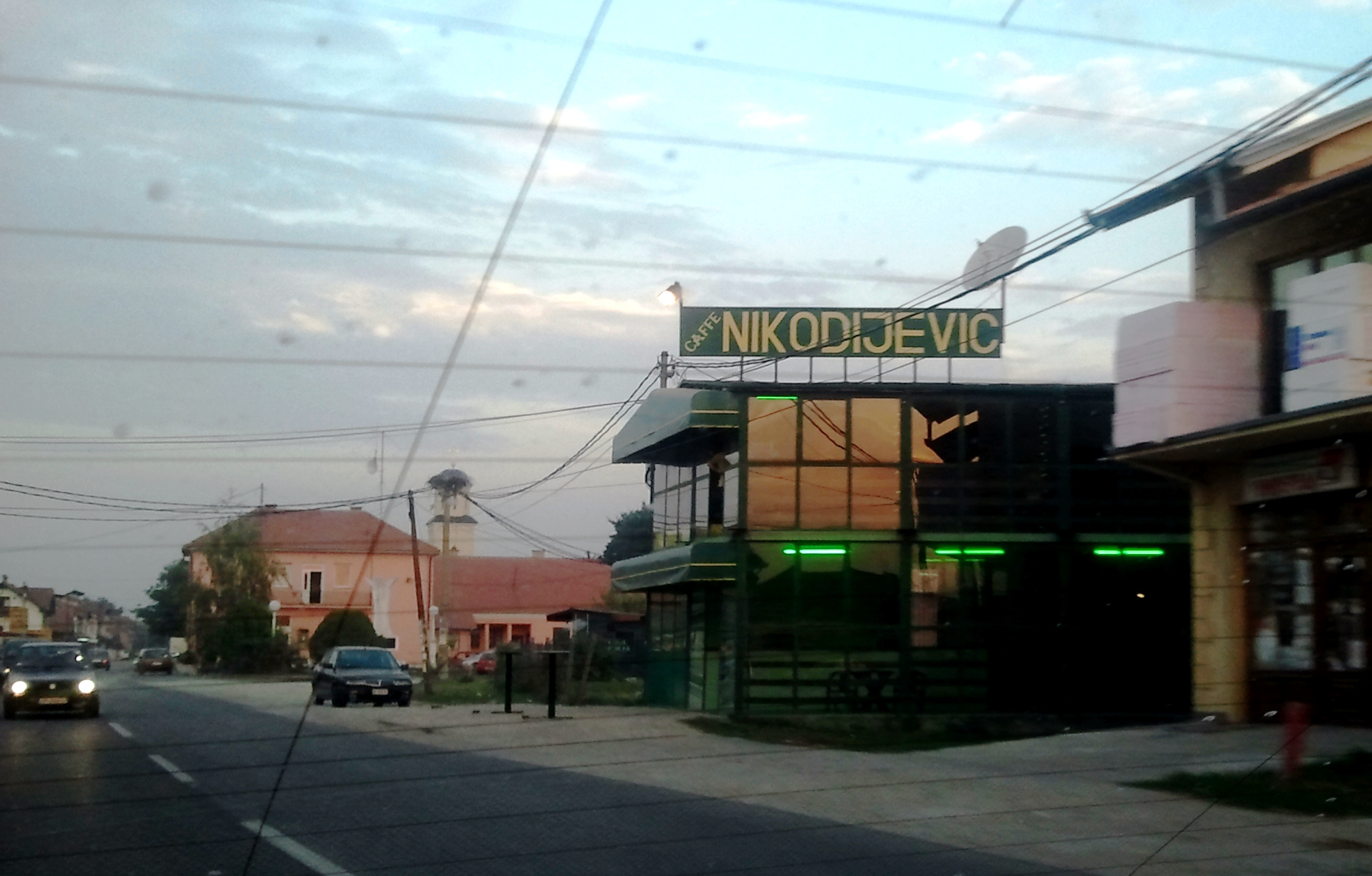 Средиште Салаковца - Salakovac Centre